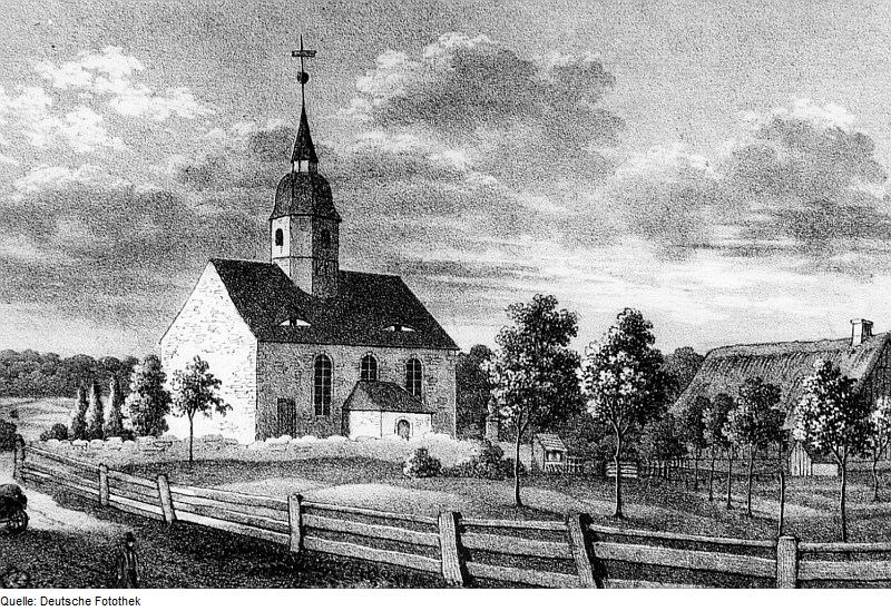 Original image description from the Deutsche Fotothek Dorfhain. Kirche zu Dorfhain